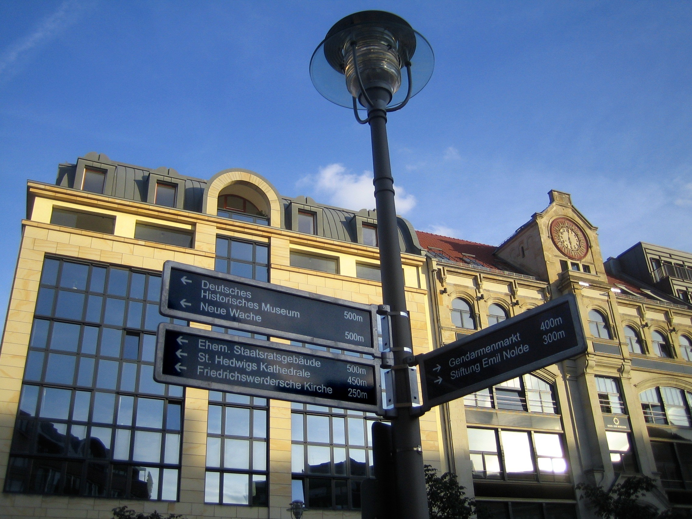 Hausvogteiplatz in Berlin-Mitte. Wegweiser zu nahe gelegenen Sehenswürdigkeiten.